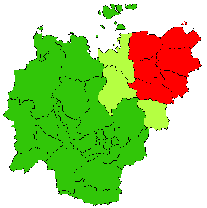 Новые границы часовых зон в Якутии (Постановление Правительства РФ от 31.08.2011 № 725)